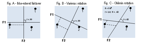 Billede af tre diagrammer til illustration af rotationsprincippet inden for faktoiranalysen